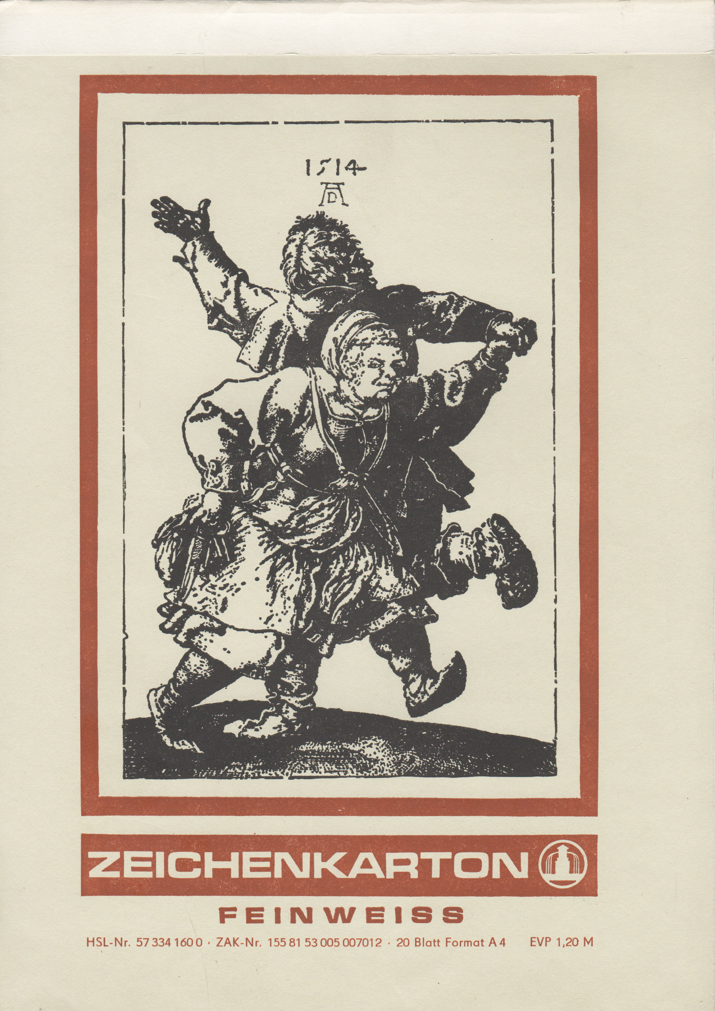 Ein Block Zeichenkarton (DDR-Unterrichtsmaterial) enthielt 20 Blatt von der Güte Feinweiss. Auf dem Deckblatt ist das Tanzende Bauernpaar von Albrecht Dürer abgebildet. Der EVP betrug 1,20 M.